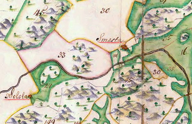 Del av General Carta öfwer Vårby säteri 1703 med Smista gård